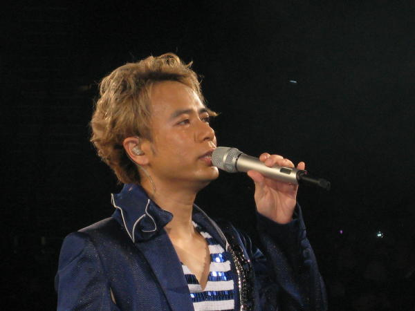 hacken lee 你的克勤演奏廳